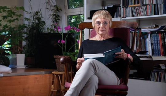 פרופסור לבלשנות רות ברמן